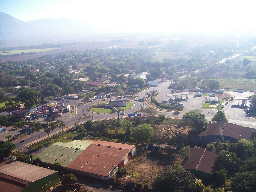 Panoramica de la Rotonda los encuentros, Chinandega.